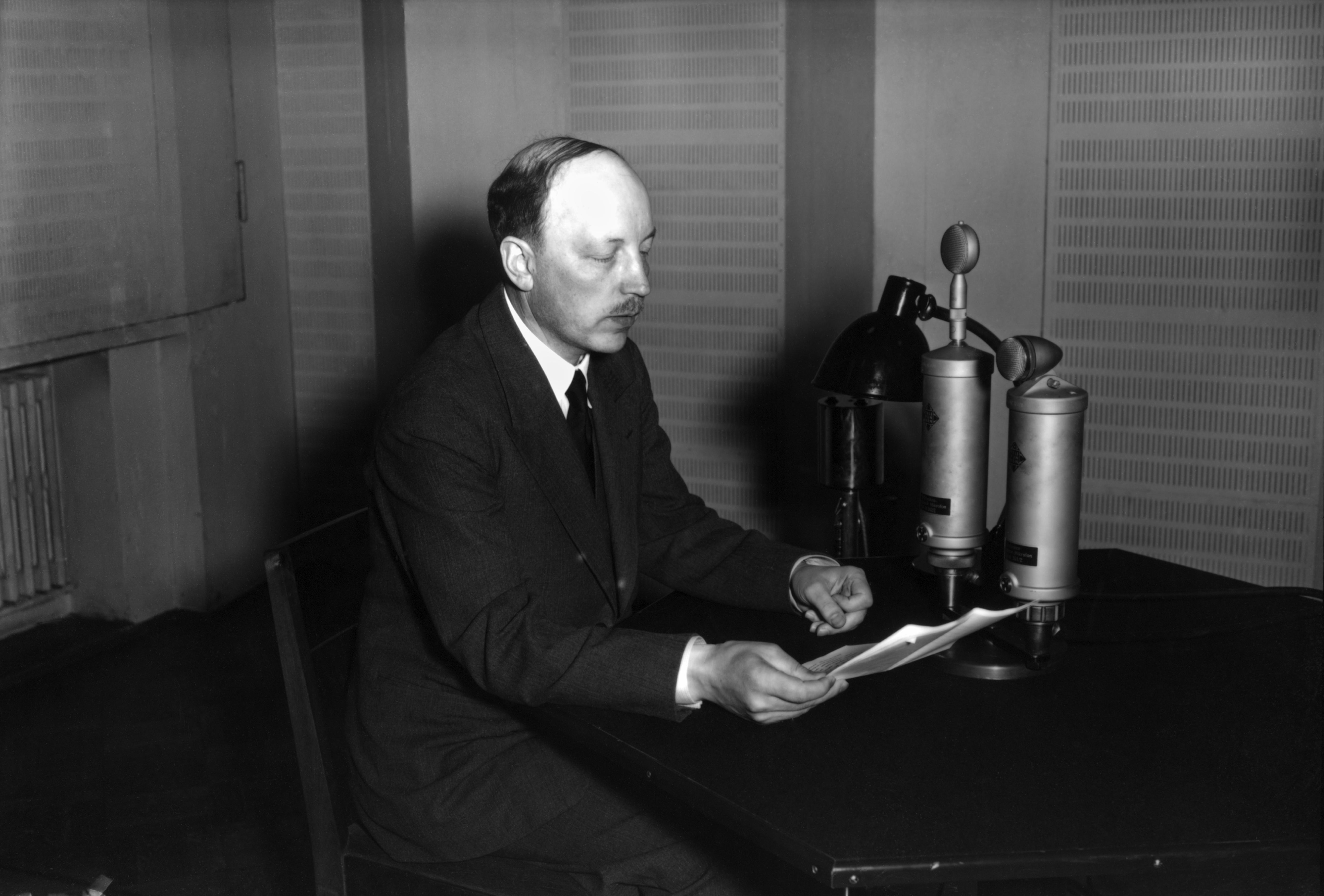 Pääministeri Risto Ryti pitämässä radiopuhetta studiossa. Tiedätkö jotain tästä kuvasta? Jätä kommentti tai ota yhteyttä sähköpostitse: Tutustu Ylen arkistosisältöihin: Fler skatter från Yles arkiv: More about Yle, the Finnish Broadcasting Company